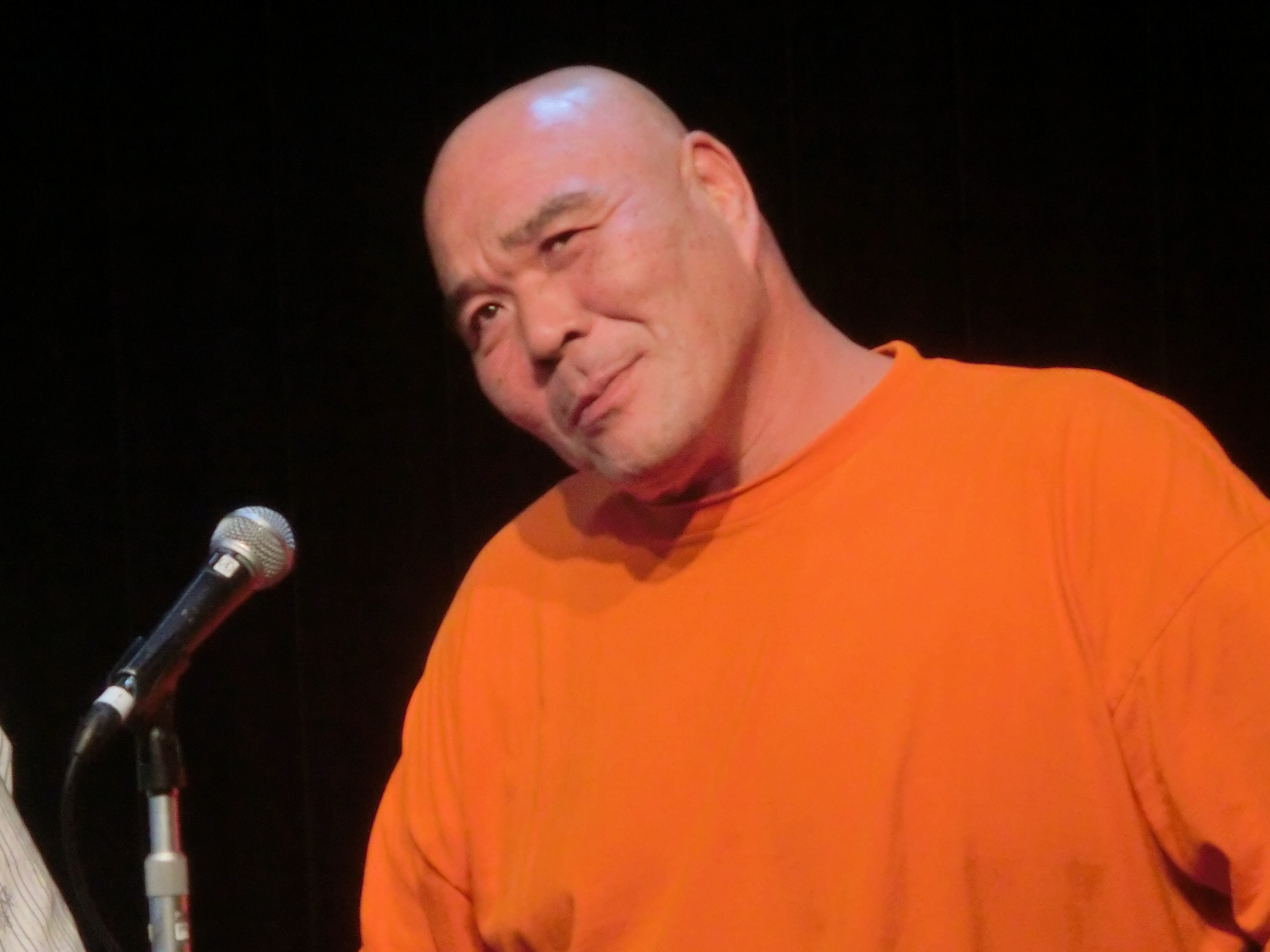 SHIBUYA LOFT9 （2019年7月13日）